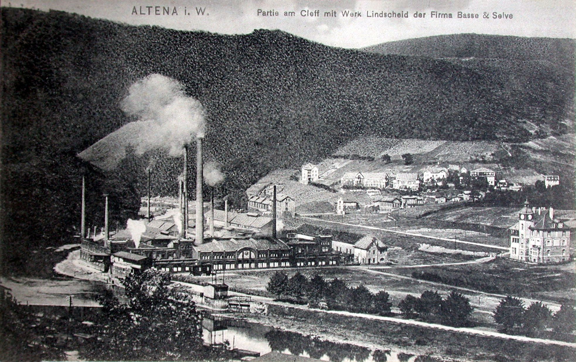 Fabrik Basse & Selve in Altena